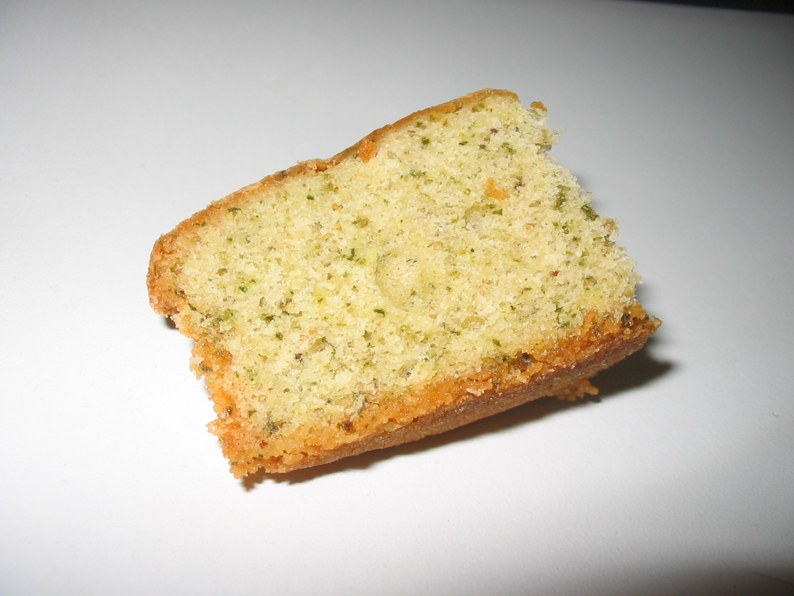 Space cake. Zelf gemaakt (de foto, niet de cake). Je kunt aan de lichte groene kleur en kleine groene stukjes duidelijk zien dat het hier niet om een 'normale' cake gaat. Dit is ook duidelijk te ruiken. Self made (the photo, not the cake). You can tell by the bright green color and small green pieces clearly see that this is not a "normal" cake goes. It is also clear to smell.